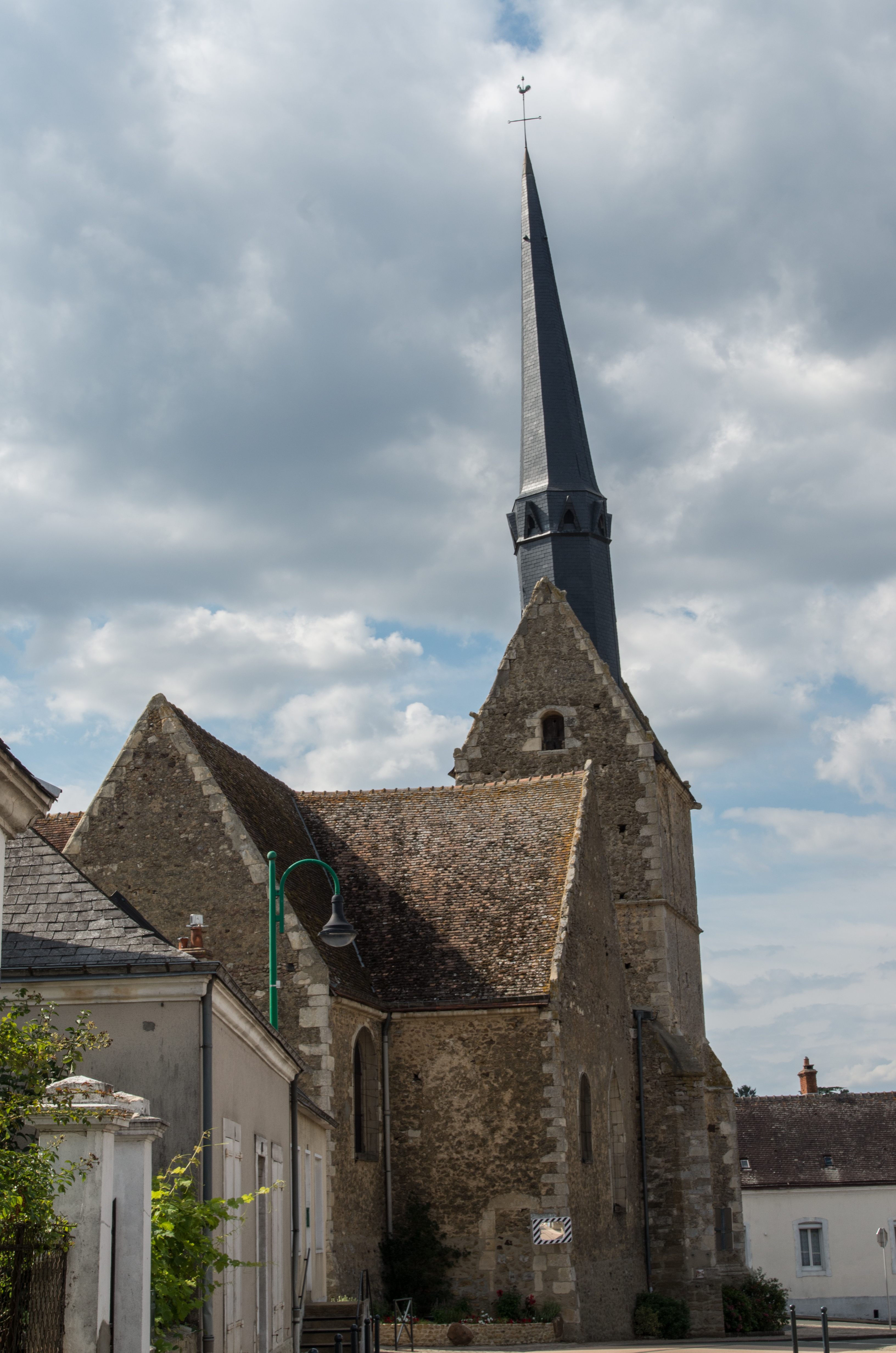 Vue rue de l'Eglise Saint-Médard de Dollon